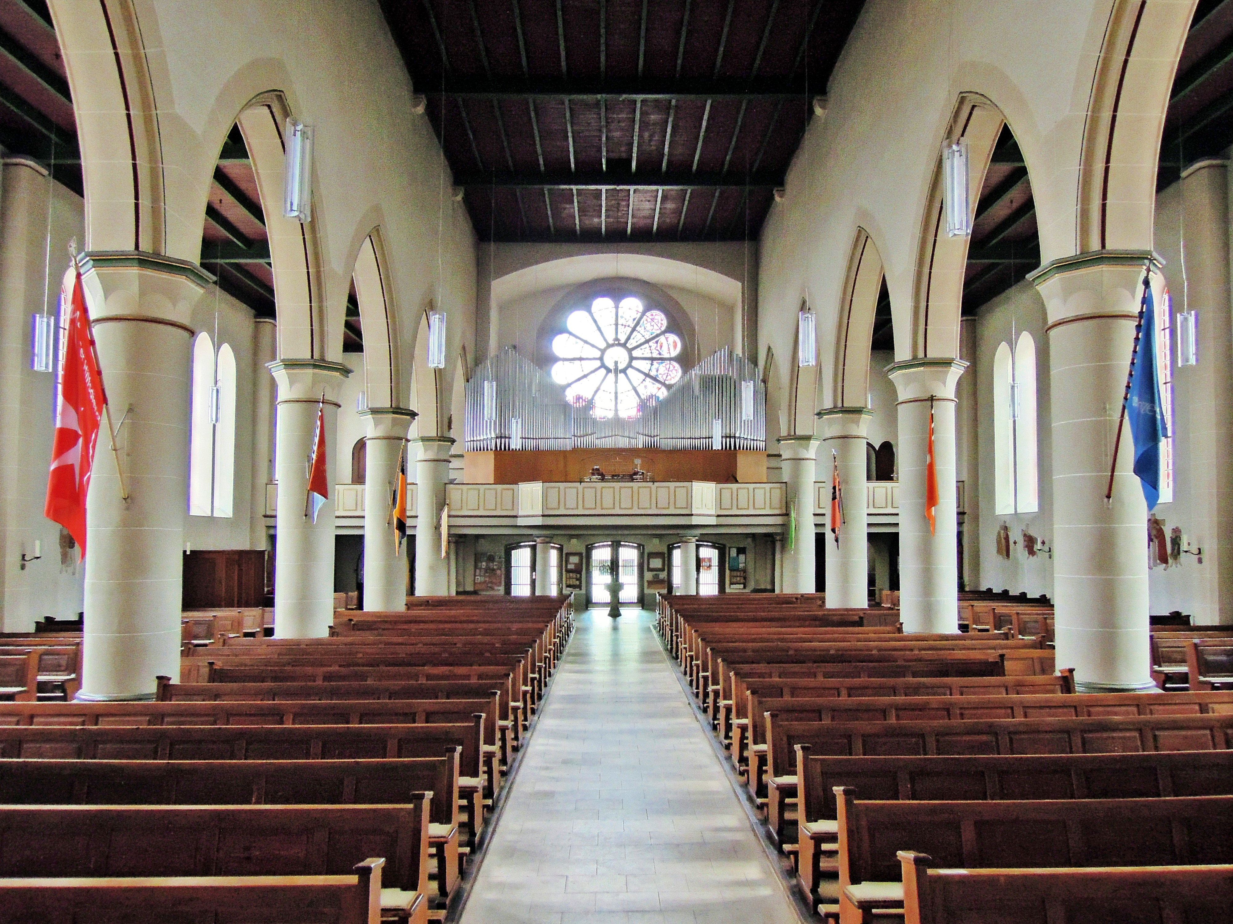 Donatusstraße, kath. Pfarrkirche Maria Himmelfahrt